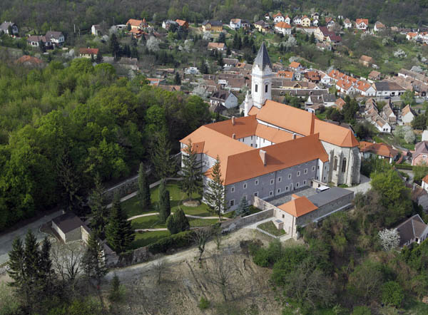 A Sopronbánfalvi Kolostor távlati képe, háttérben Sopronbánfalvával